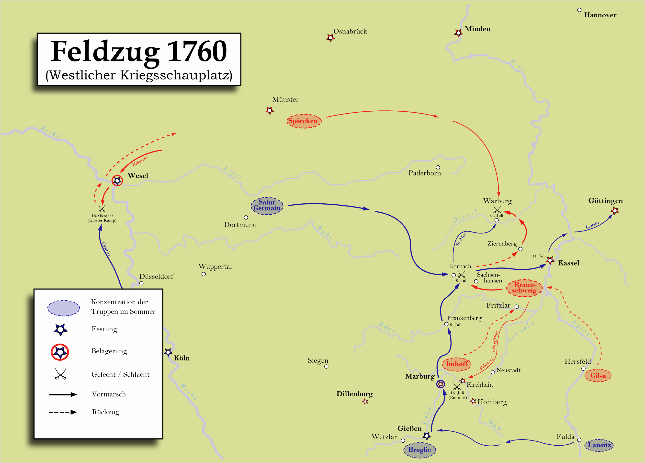 Karte zum Verlauf der Operationen auf dem westlichen Kriegsschauplatz im Jahre 1760 während des Siebenjährigen Krieges (1756-1763).